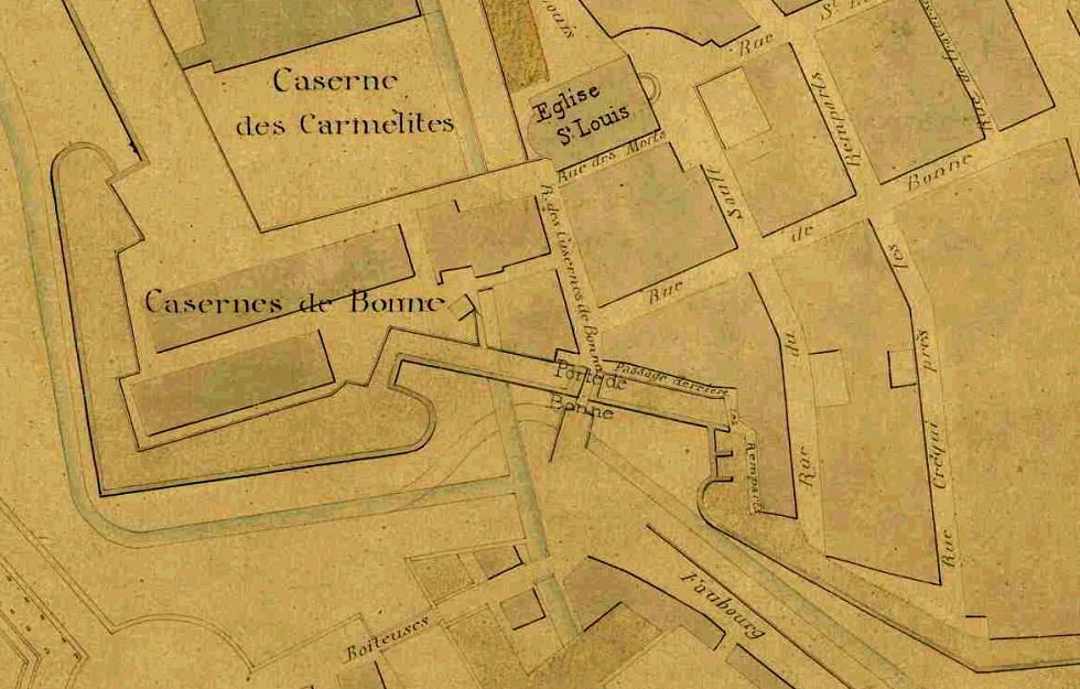 Détail plan général de la ville de Grenoble en 1813 (site de la porte de Bonne). Archives municipales de Grenoble, cote 2FI 1617.